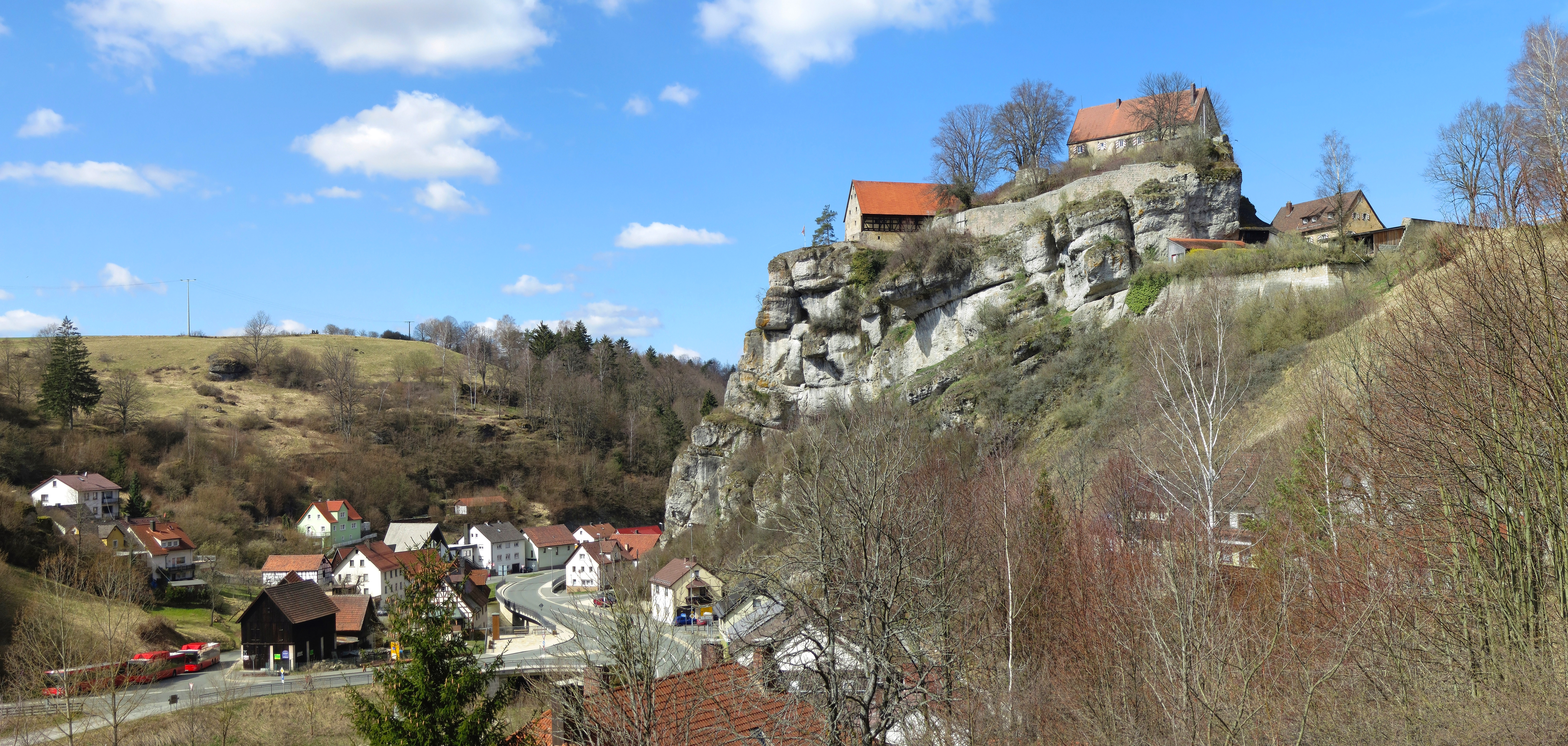 Die Burg Pottenstein auf dem Burgberg von Pottenstein in der Fränkischen Schweiz. Die Burg beherbergt ein Burgmuseum und wurde zwischen 1057 und 1070 gegründet. Nach dem Übergang des Bistums Bamberg 1803 an den bayerischen Staat während der Säkularisation verfiel die Burg. 1878 kam die Burg in Privatbesitz und ist heute im Familienbesitz der von Wintzingerode.